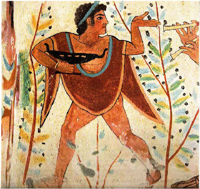 Tombe des Léopards, dans la nécropole de Tarquinia, fresque des musiciens et des danseurs datée de - 480